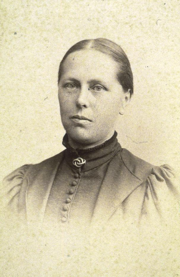 Photographie de Camille Vidart par Louise Fueslin-Rigaud, conservée à la Bibliothèque de Genève